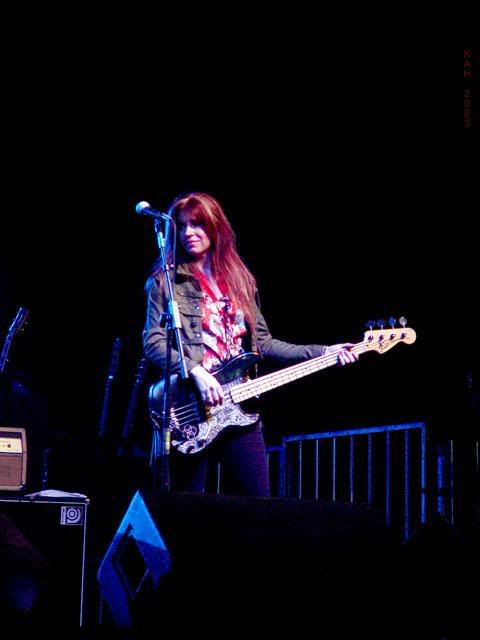 Fotografie Jpeg di Micki Steele